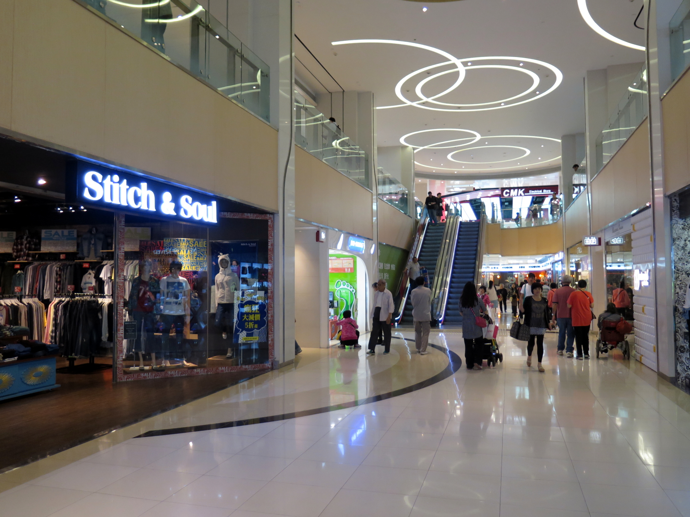 Chung Fu Plaza Void Access